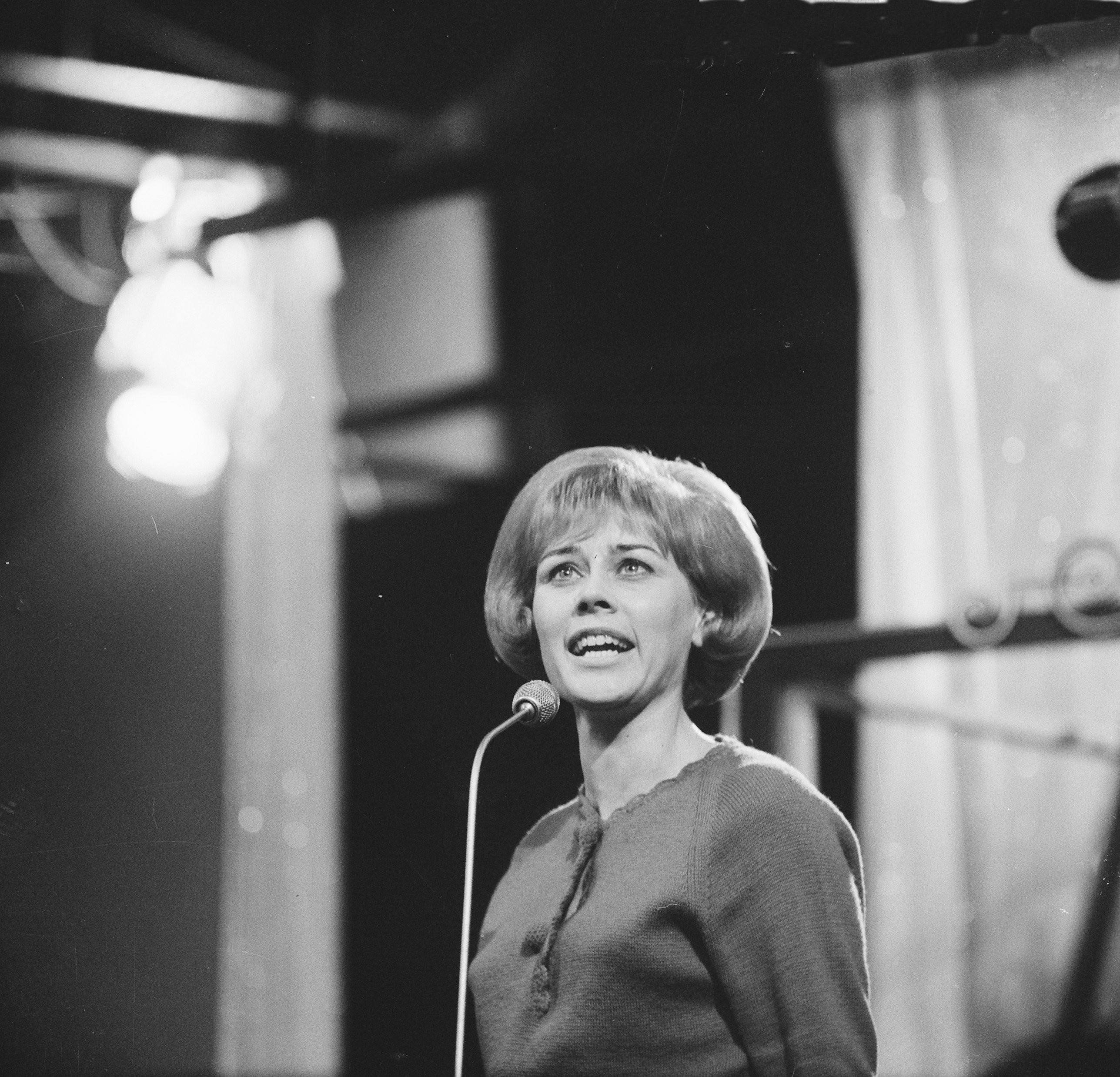 Collectie / Archief : Fotocollectie Anefo Reportage / Serie : [ onbekend ] Beschrijving : Finale Nationaal Songfestival 1965, Connie Vandenbos (zingend) Datum : 13 februari 1965 Trefwoorden : artiesten, muziek, songfestival, zangeressen Persoonsnaam : Vandenbos, Conny Fotograaf : Nijs, Jac. de / Anefo Auteursrechthebbende : Nationaal Archief Materiaalsoort : Negatief (zwart/wit) Nummer archiefinventaris : bekijk toegang 2.24.01.03 Bestanddeelnummer : 917-4303